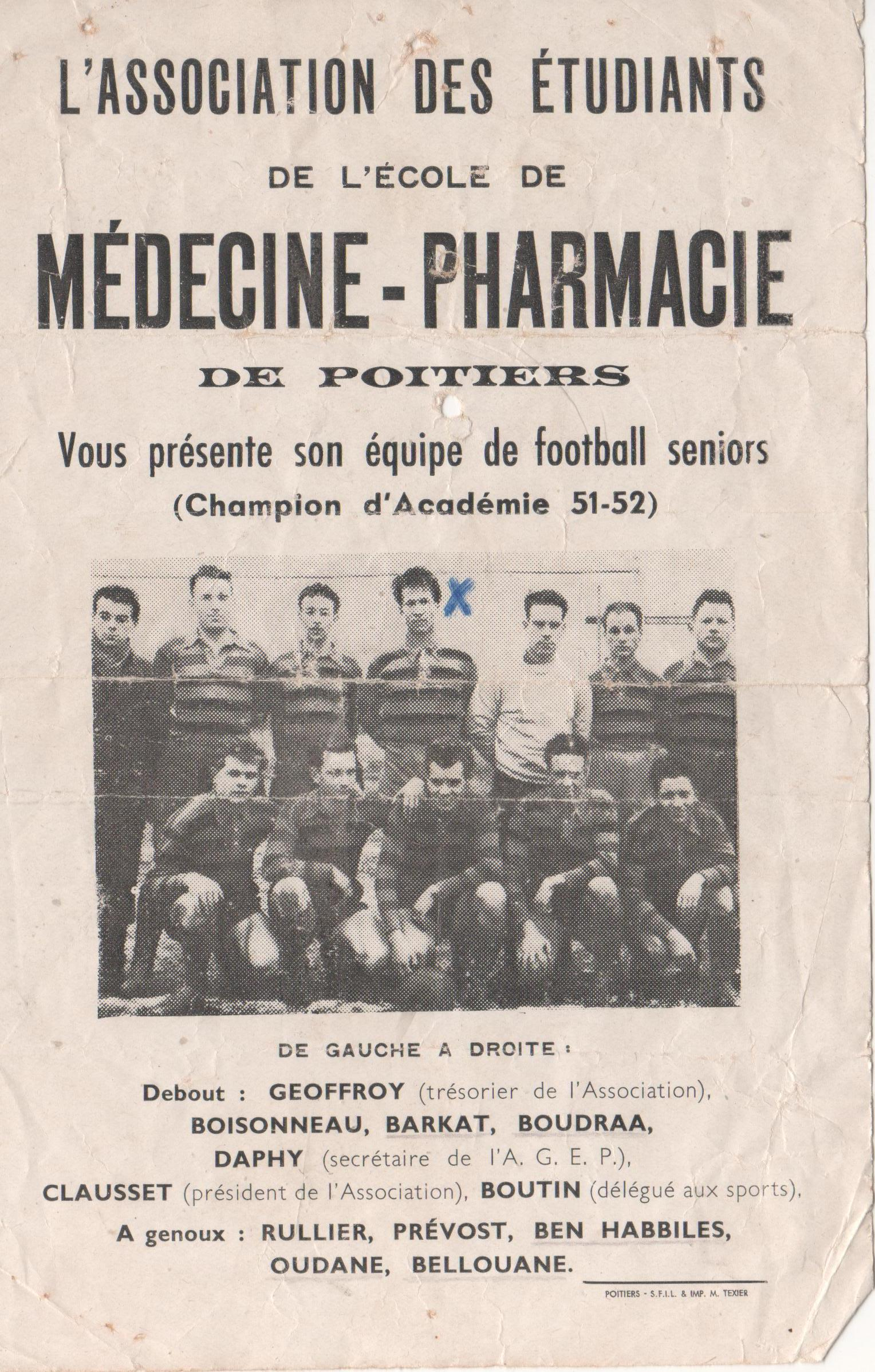 equipe football, professeur Boudraa au centre